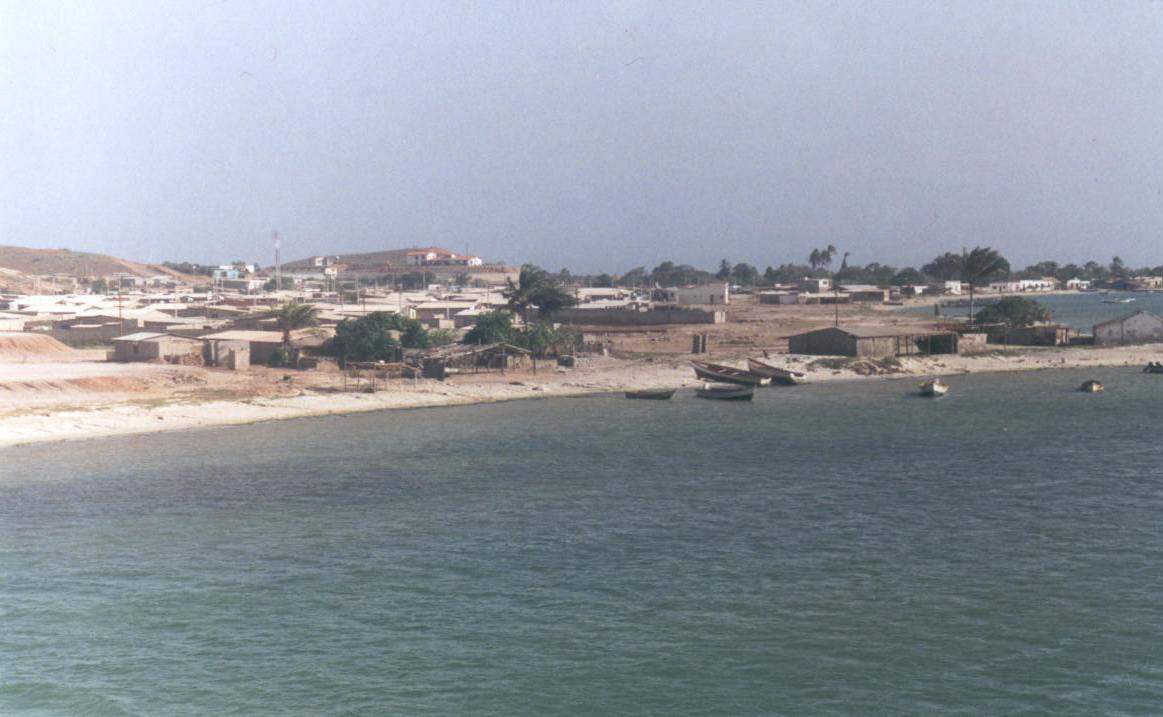 La ciudad de San Pedro de Coche, ubicada en el ángulo suroeste de la Isla de Coche, es la principal población de toda la isla, la capital del municipio Villalba y su principal puerto. Se encuentra a sotavento de la isla, por lo que, a pesar de la fuerza de la brisa, el mar permanece sin olas, condición ideal para la práctica del windsurf. Puede verse la fuerza del viento por sus efectos en la escasa vegetación. Autor: Fev. Fecha: Junio 1996.